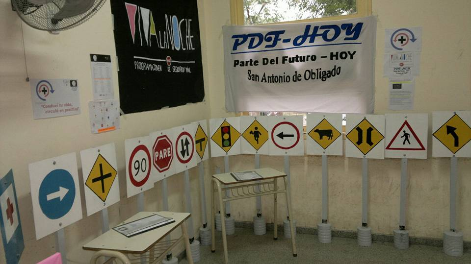 Educación vial